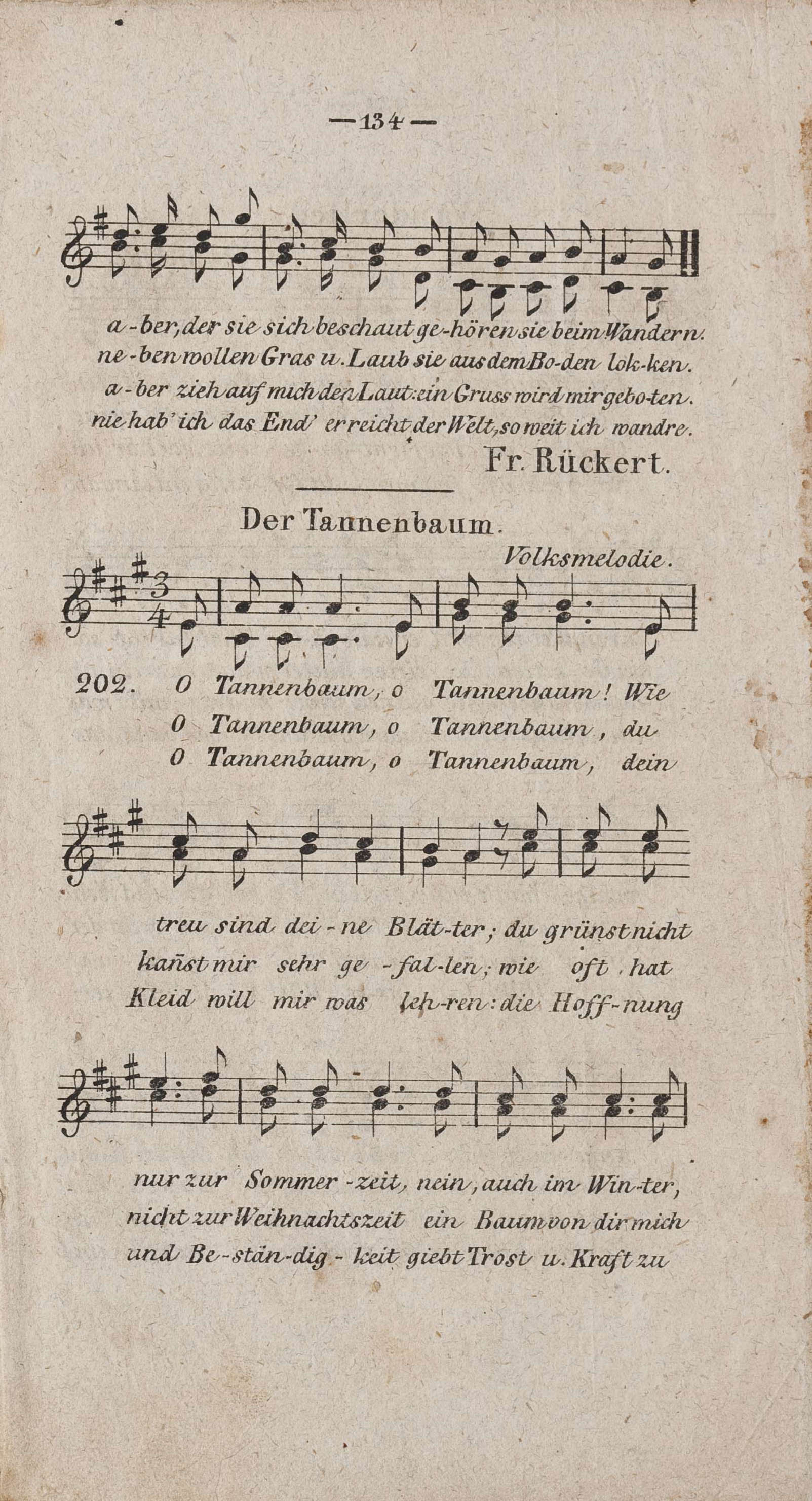 Das Lied Der Tannenbaum (O Tannenbaum) im Musikalischen Schulgesangsbuch von Ernst Anschütz